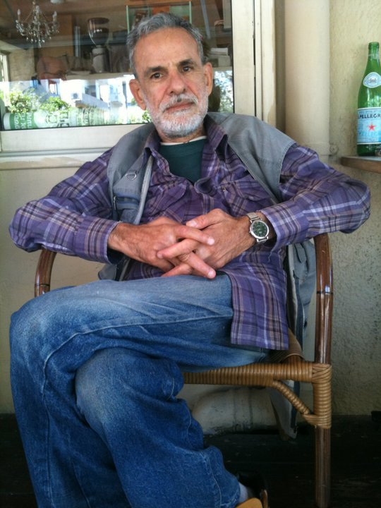 מנחם מזרחי צילום של שלומית כרמלי